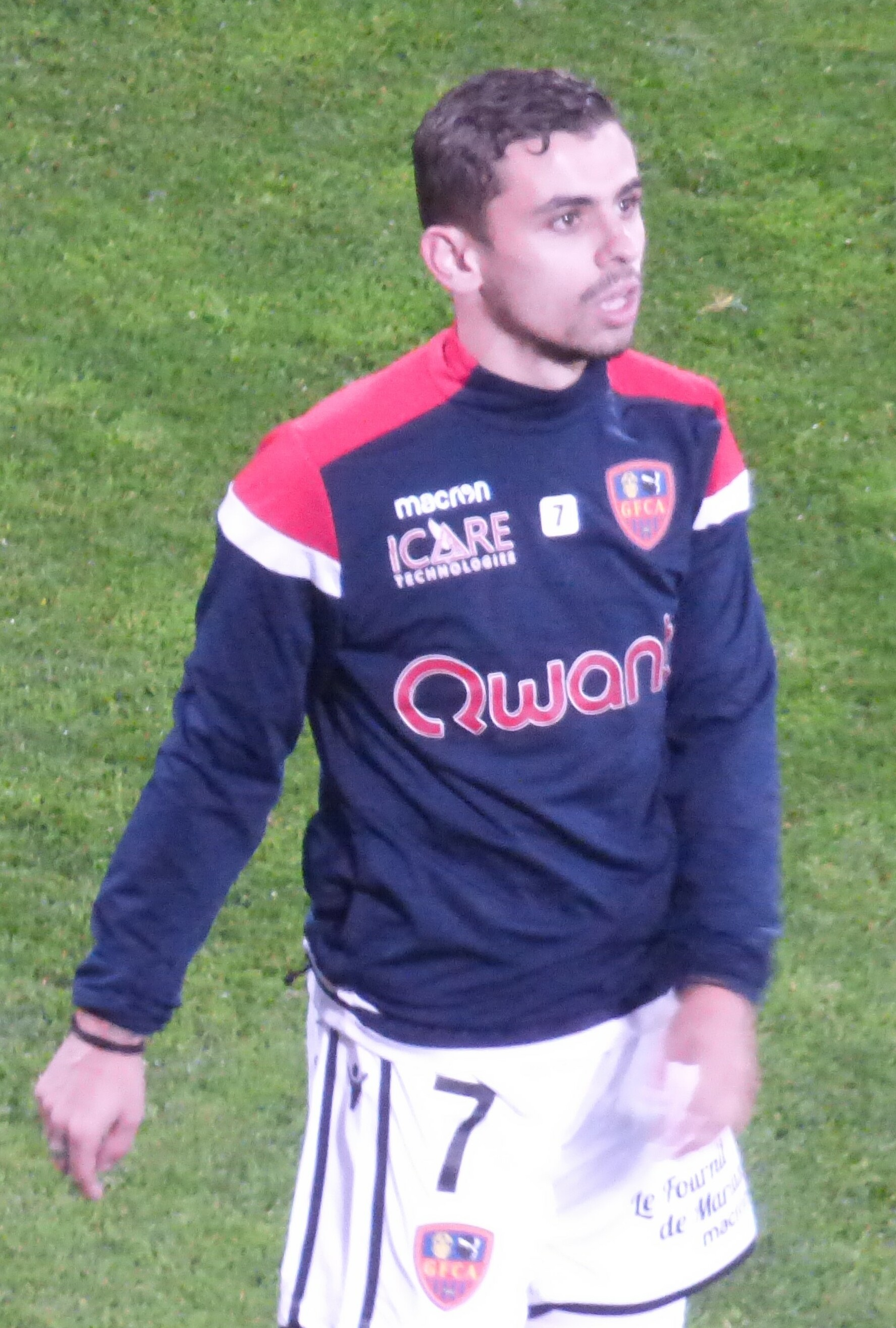 Alexis Araujo avant le match RC Lens / GFC Ajaccio, comptant pour la onzième journée du championnat de France de Ligue 2 2018-2019 au Stade Bollaert-Delelis, le 22 octobre 2018.